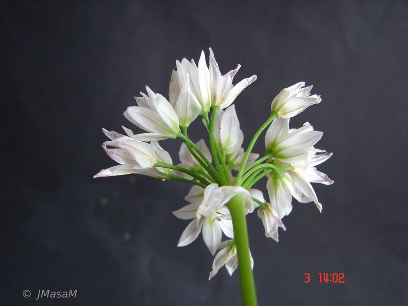 Inflorescencia de Allium massaessylum